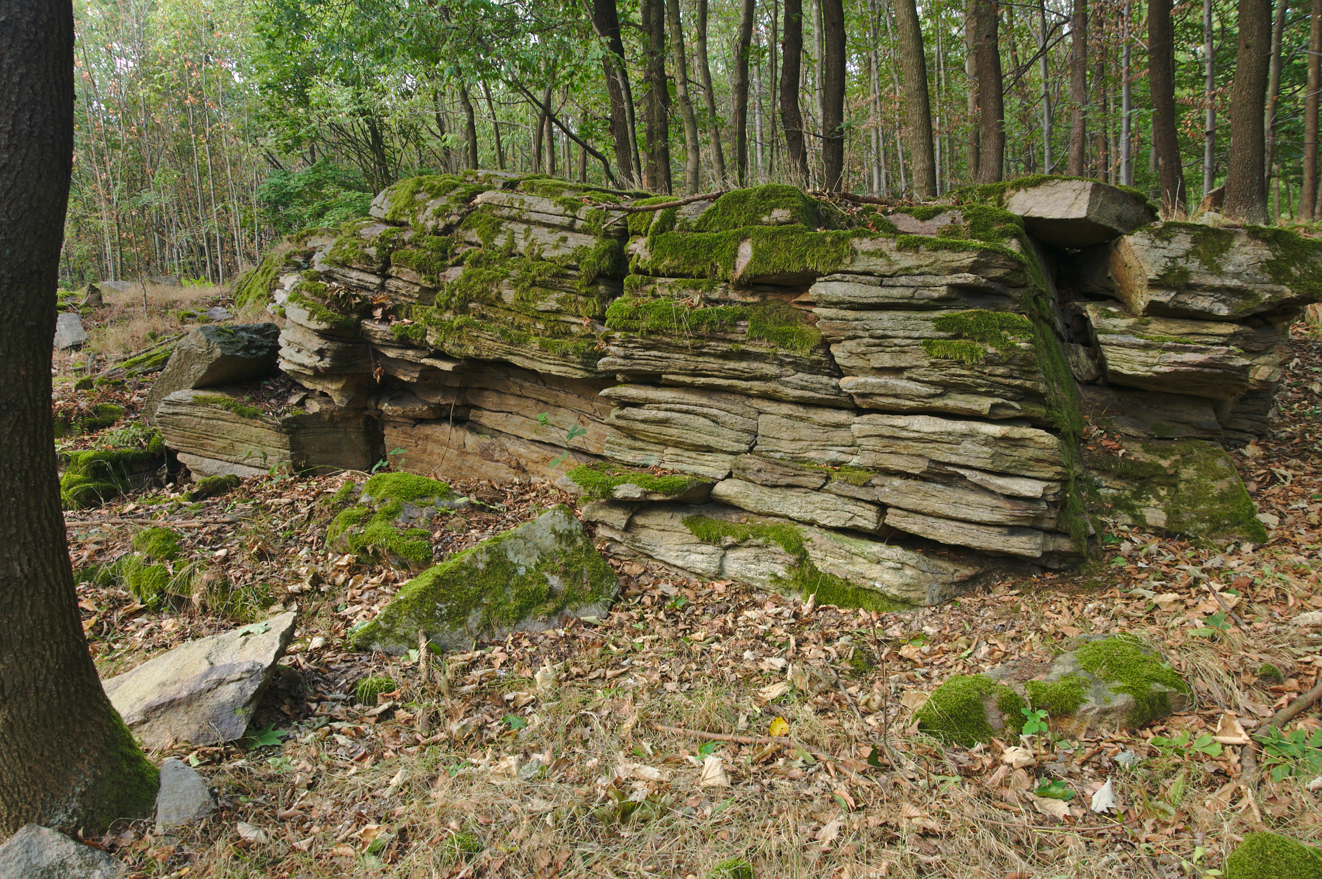 Přírodní rezervace Pod Sýkořskou myslivnou, okres Brno-venkov